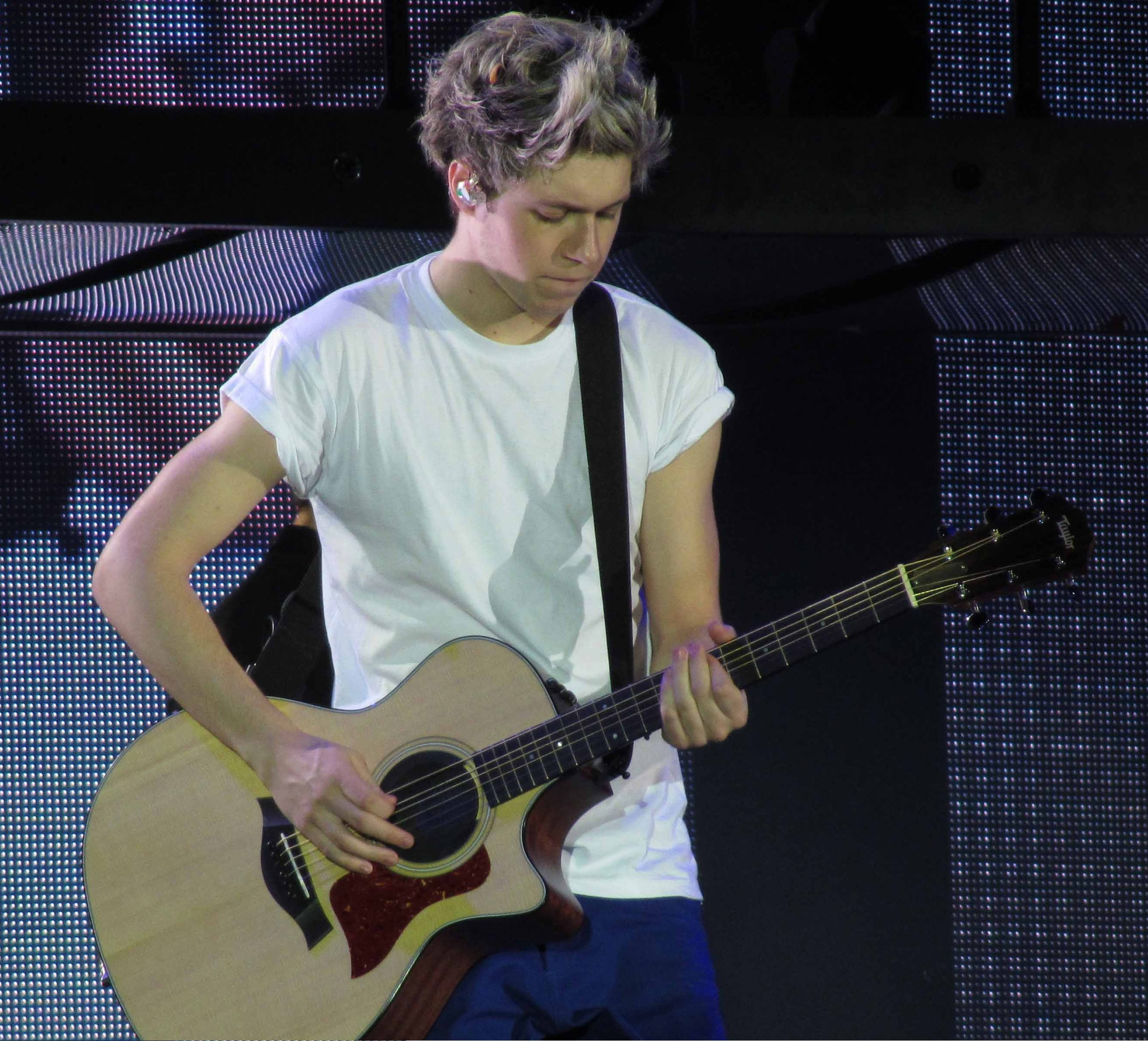 reyes garcia con niall horan